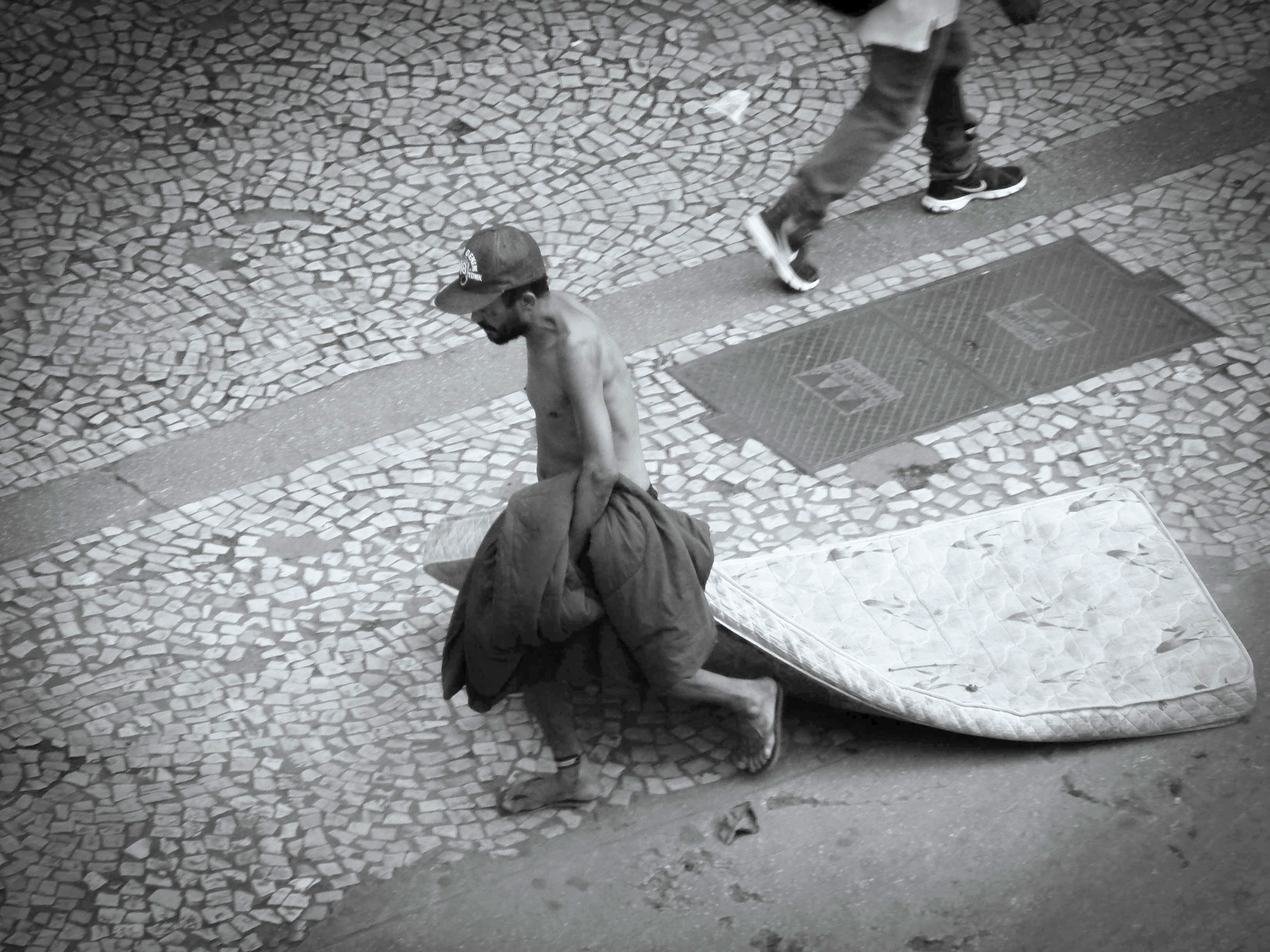 Poverty in República - São Paulo